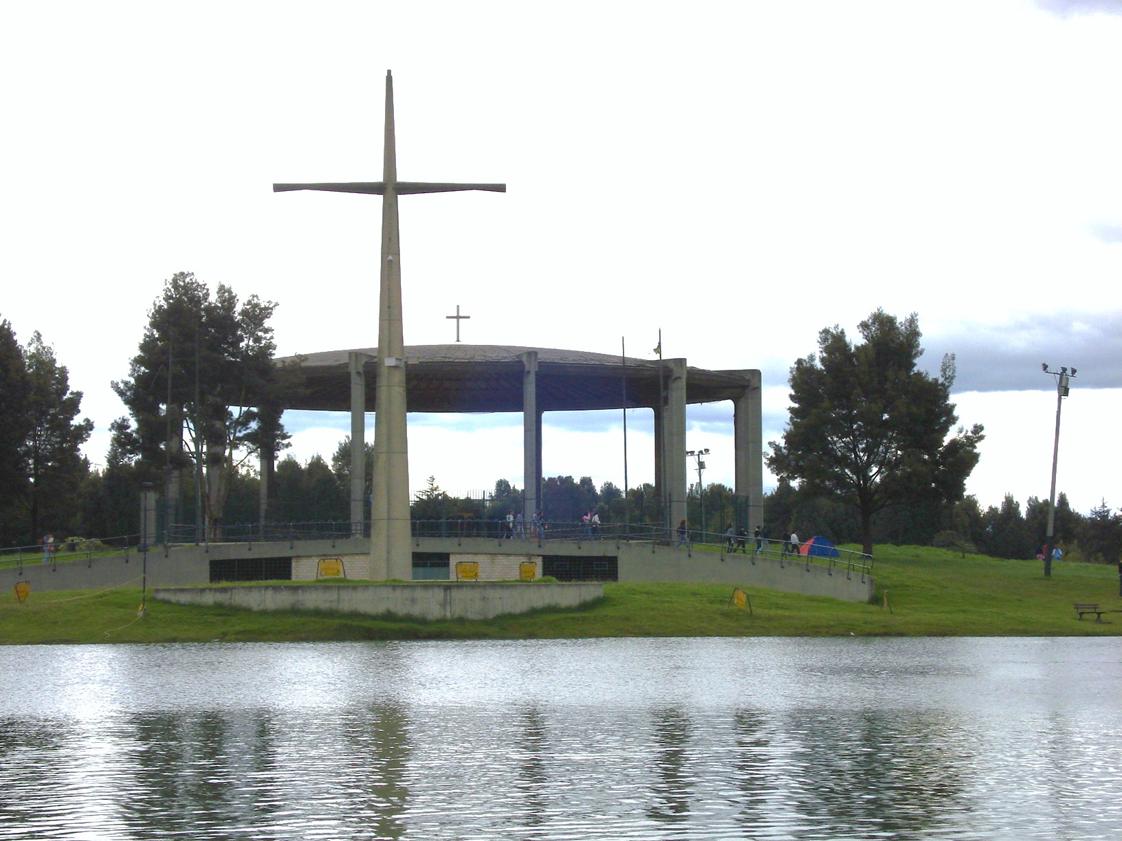 Templete eucaristico del Parque Metropolitano Simón Bolívar (Colombia)